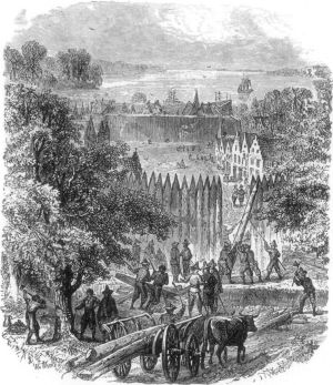 Bouw van pallisade nieuw amsterdam. Afkomstig van Project Gutenberg